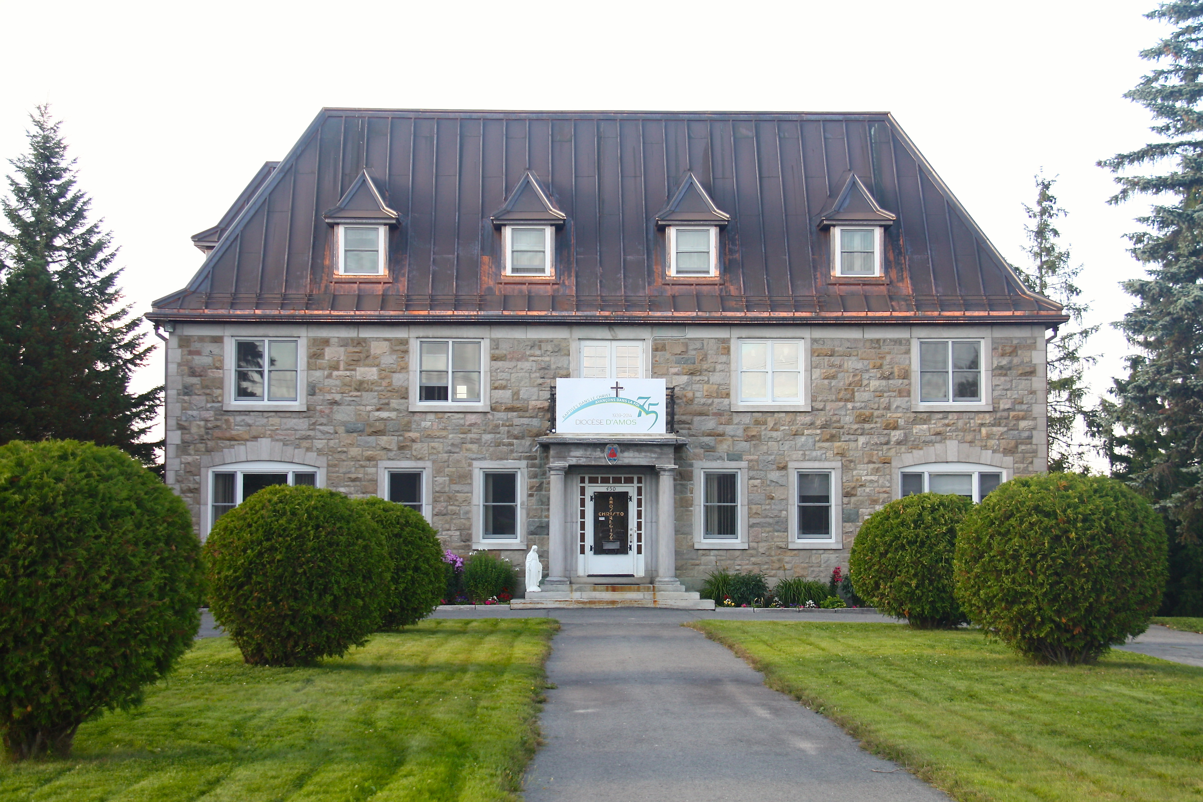 Évêché d'Amos, 450, rue Principale Nord, Amos (Canada). (Protection IP cité. Voir la liste des lieux patrimoniaux de l'Abitibi-Témiscamingue pour plus de détails).